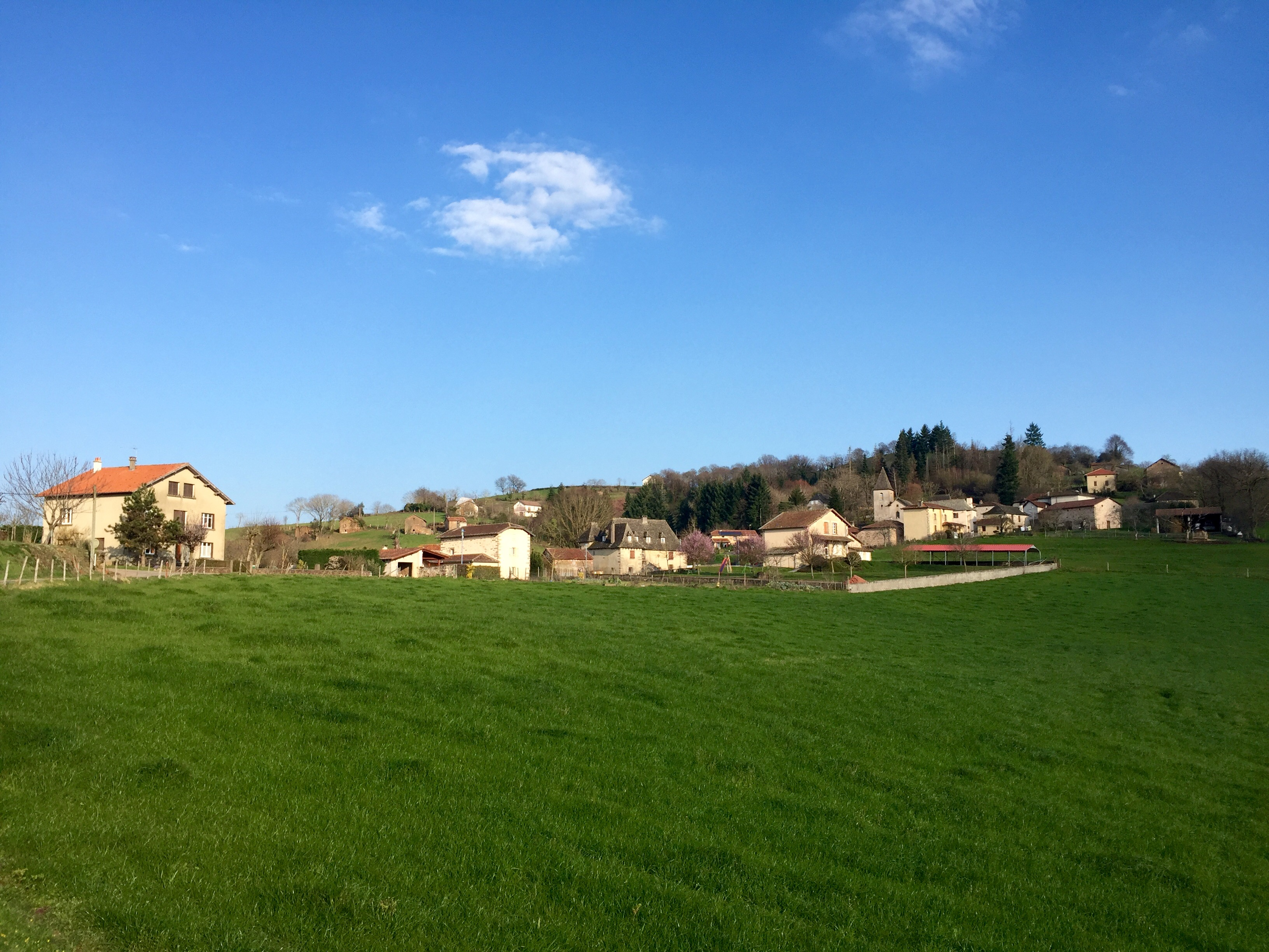 Le bourg